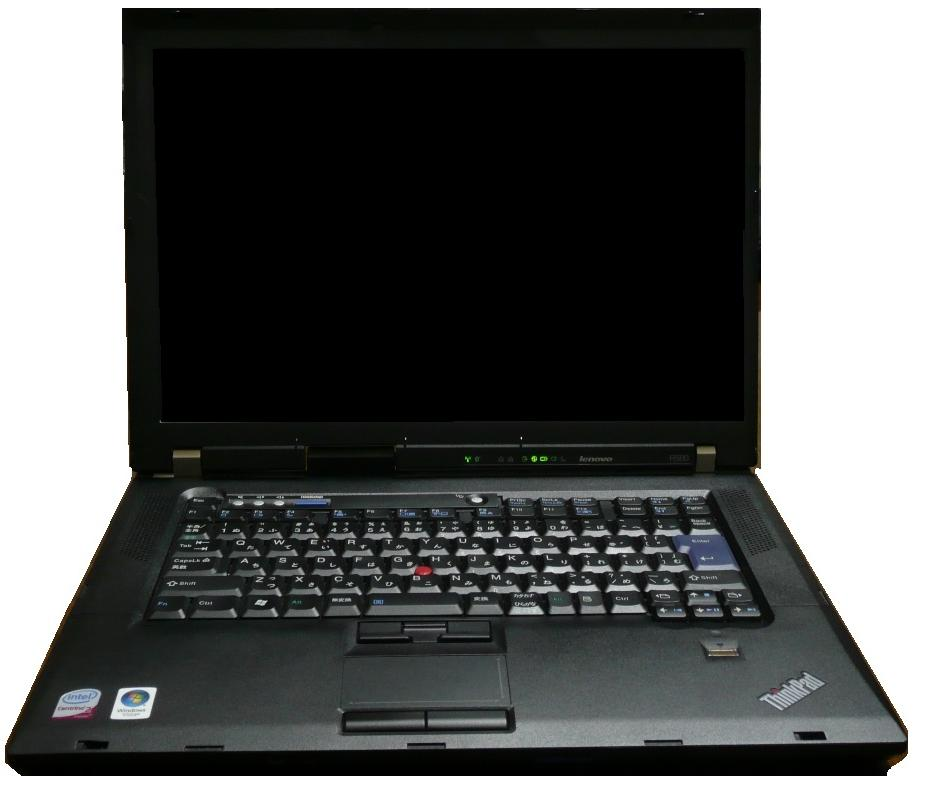 Lenovo ThinkPad R500.